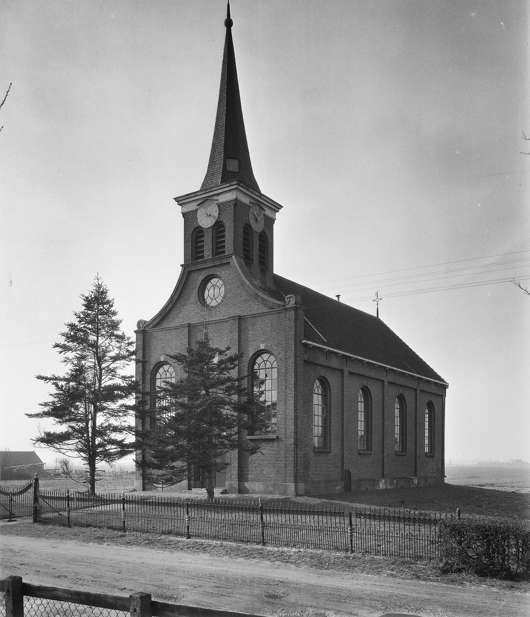 Nederlands Hervormde Kerk: exterieur naar het noord-oosten